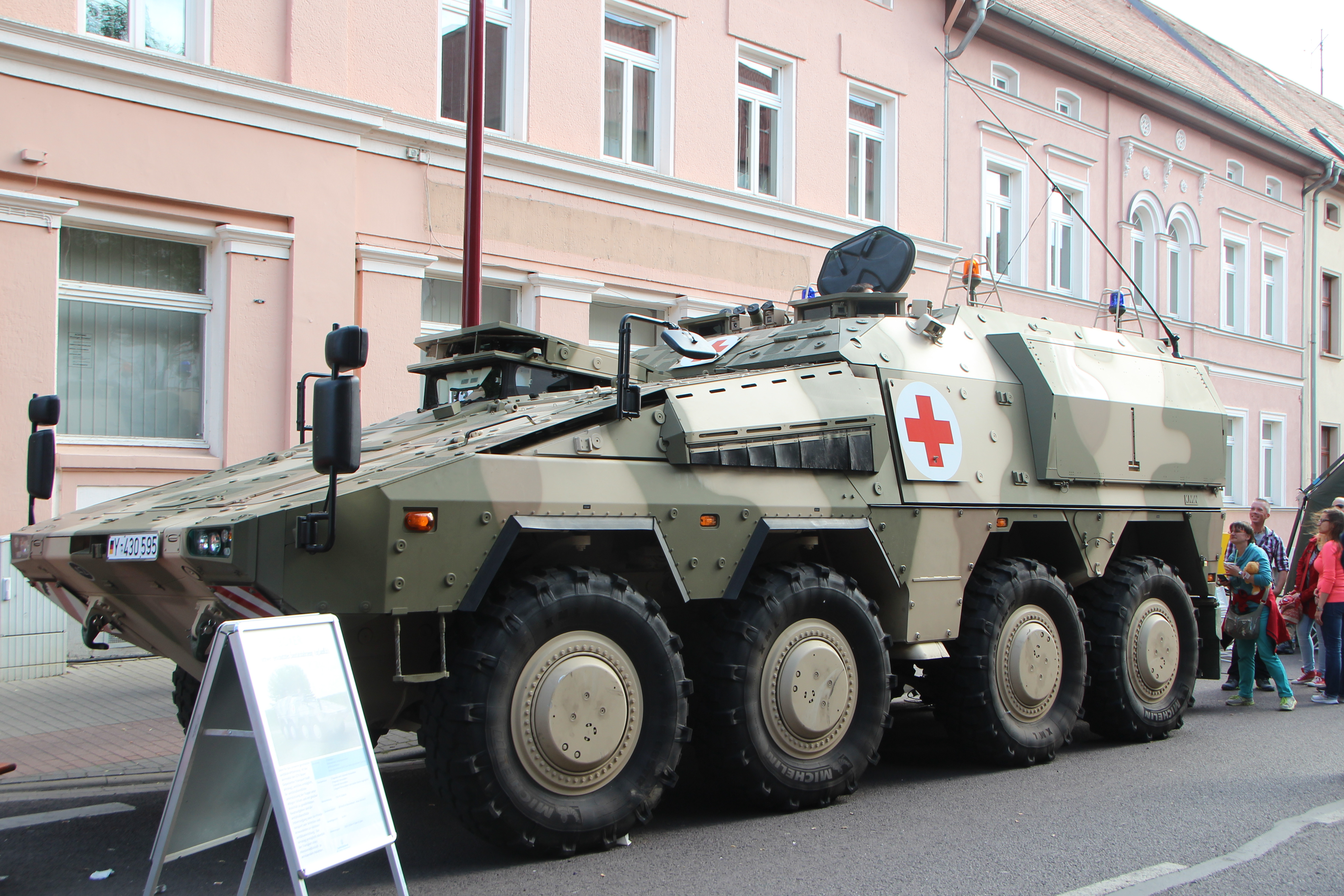 Der Sachsen-Anhalt-Tag 2015 in Köthen. Sachsen-Anhalt-Tag 2015, schweres geschütztes Sanitätskraftfahrzeug (sgSanKfz)